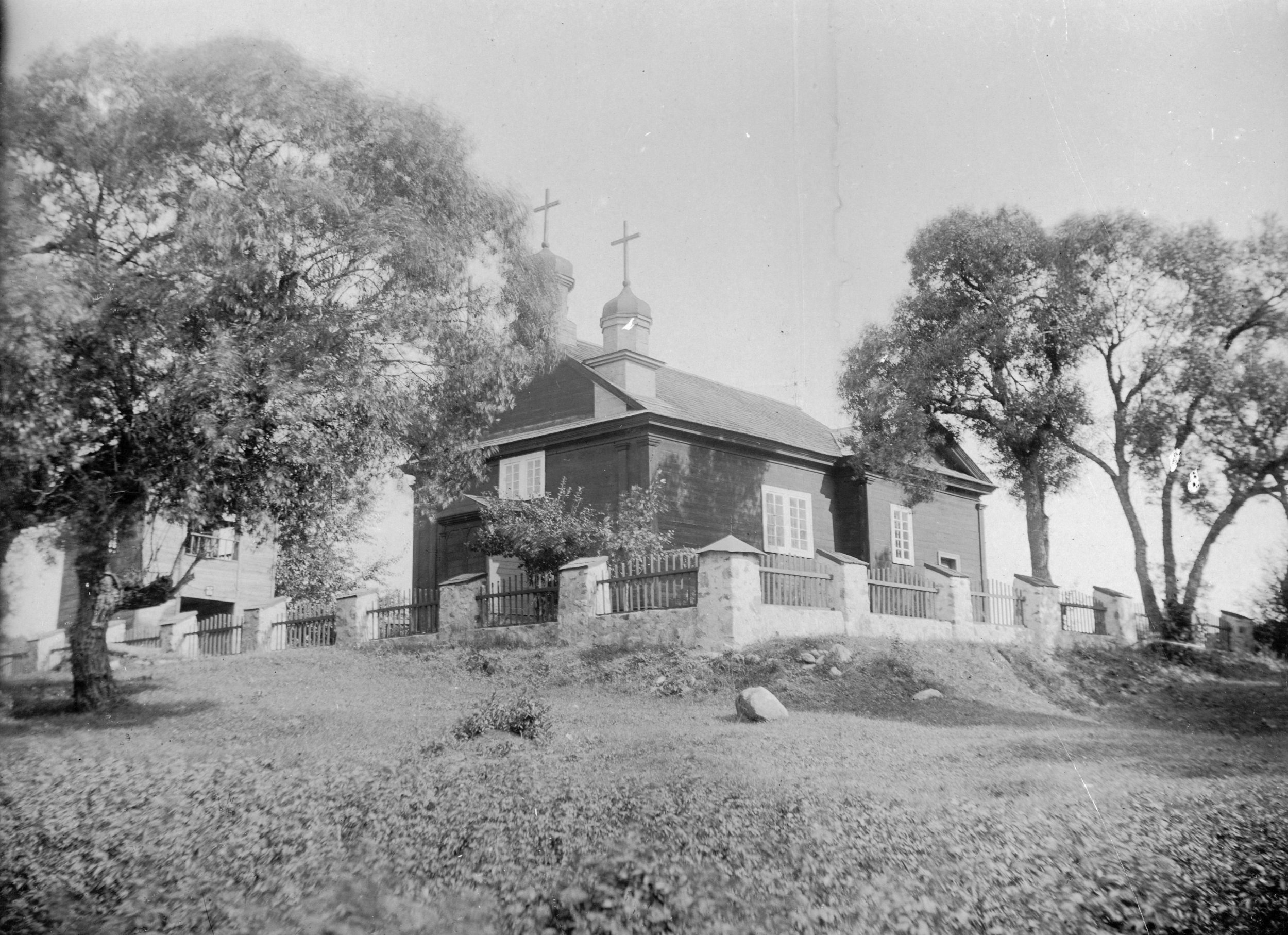 Беларуская (тарашкевіца): Рэчкі (Rečki). Царква Сьвятога Духа